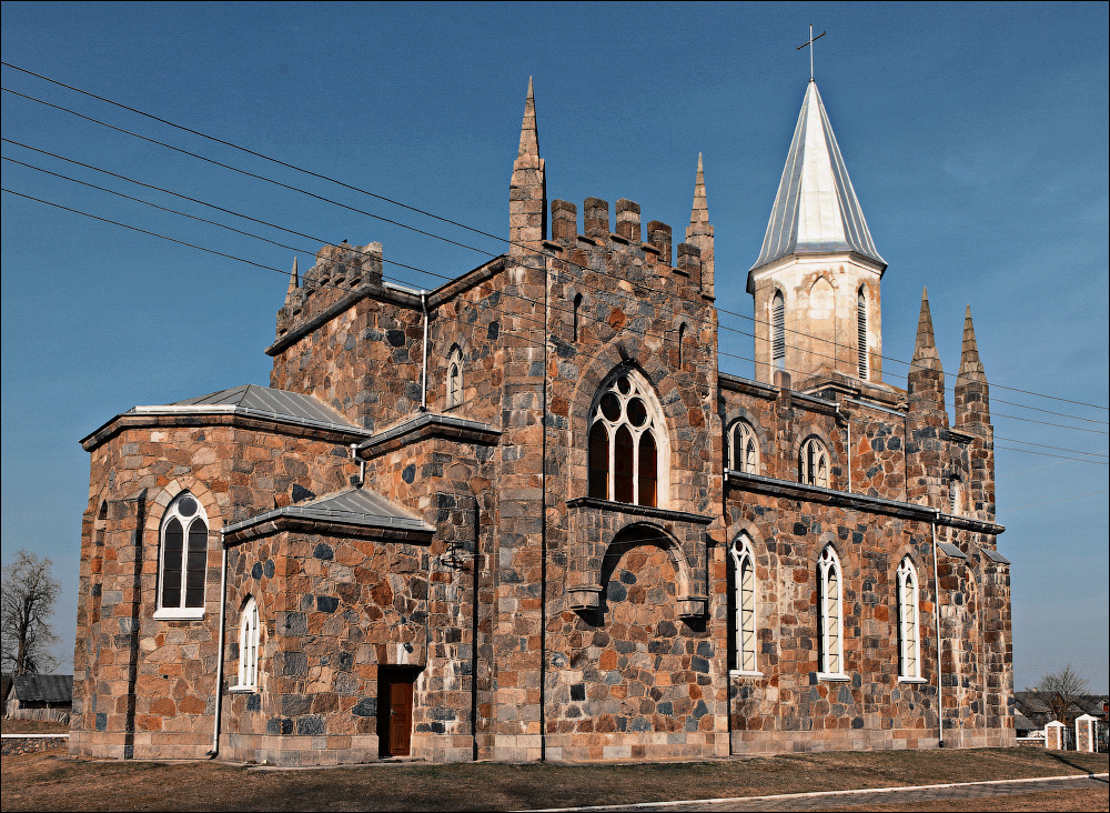 Пескі. Касцёл Маці Божай Ружанцовай